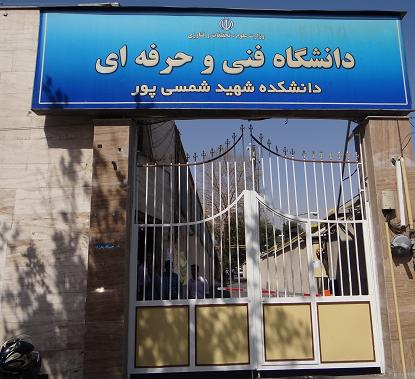 سردرجدید دانشکده فنی شهید شمسی پور تهران